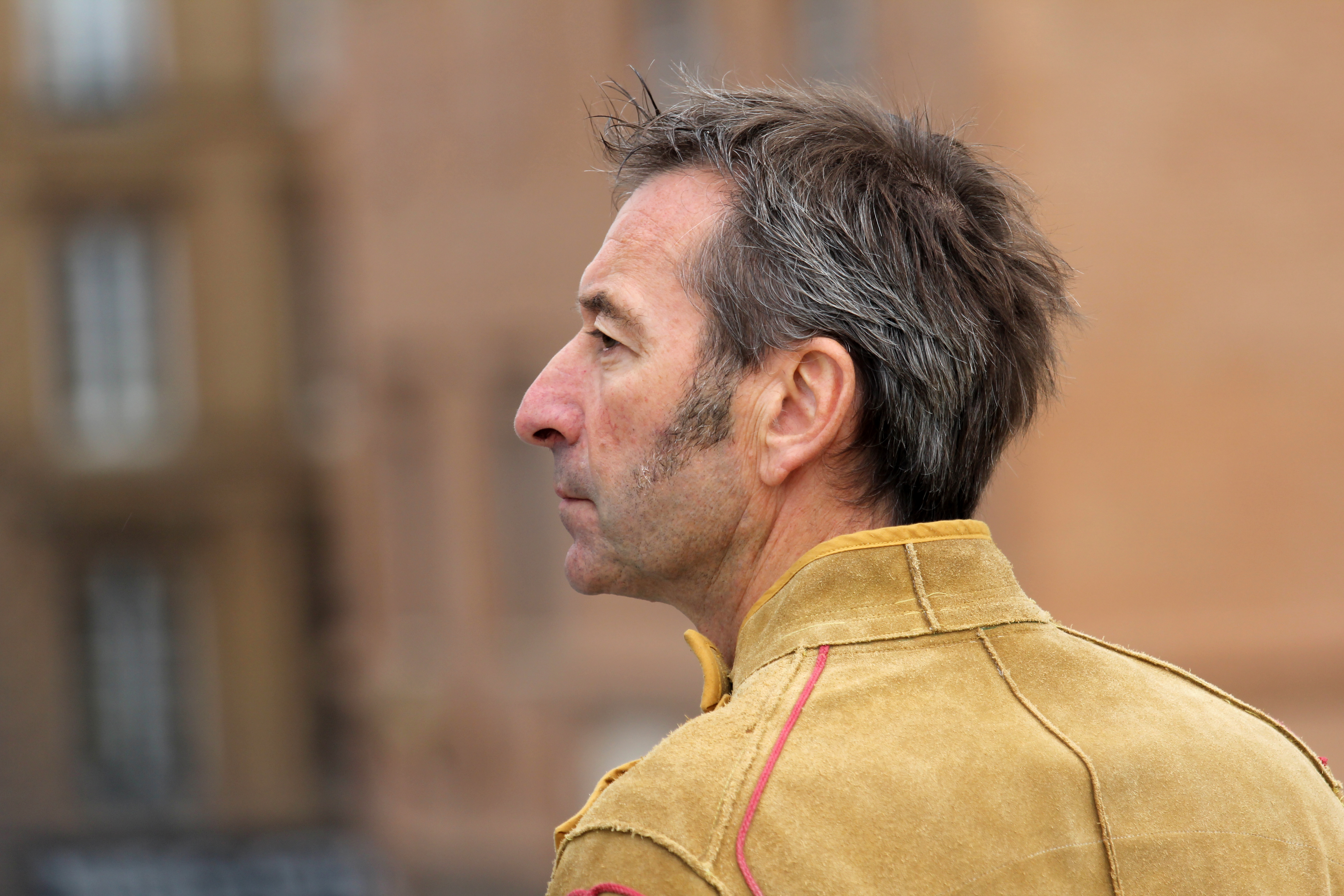 François Delarozière sur le pont Neuf à Toulouse